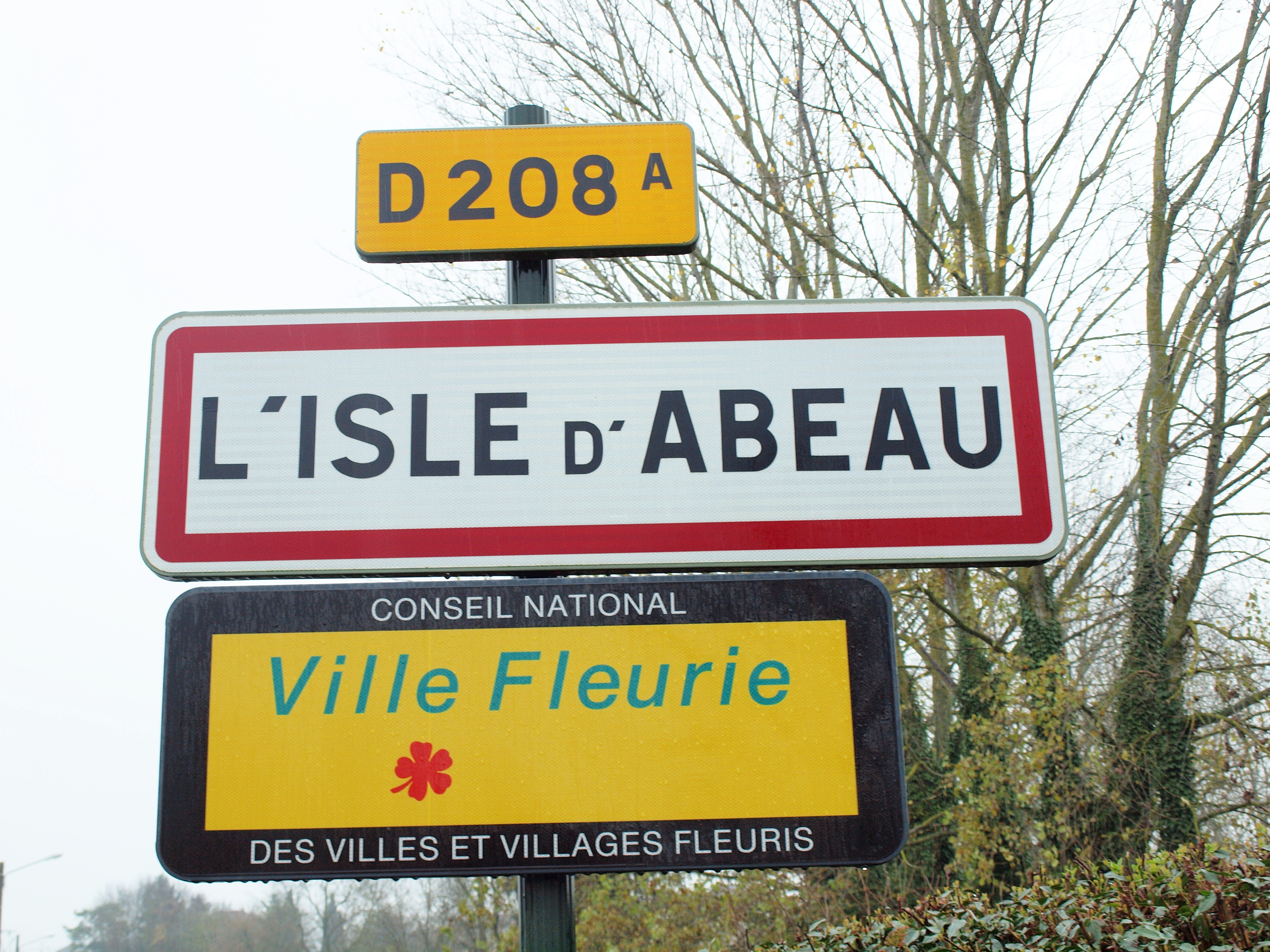 L'Isle-d'Abeau (Isère, France) ; panneau d'agglomération.